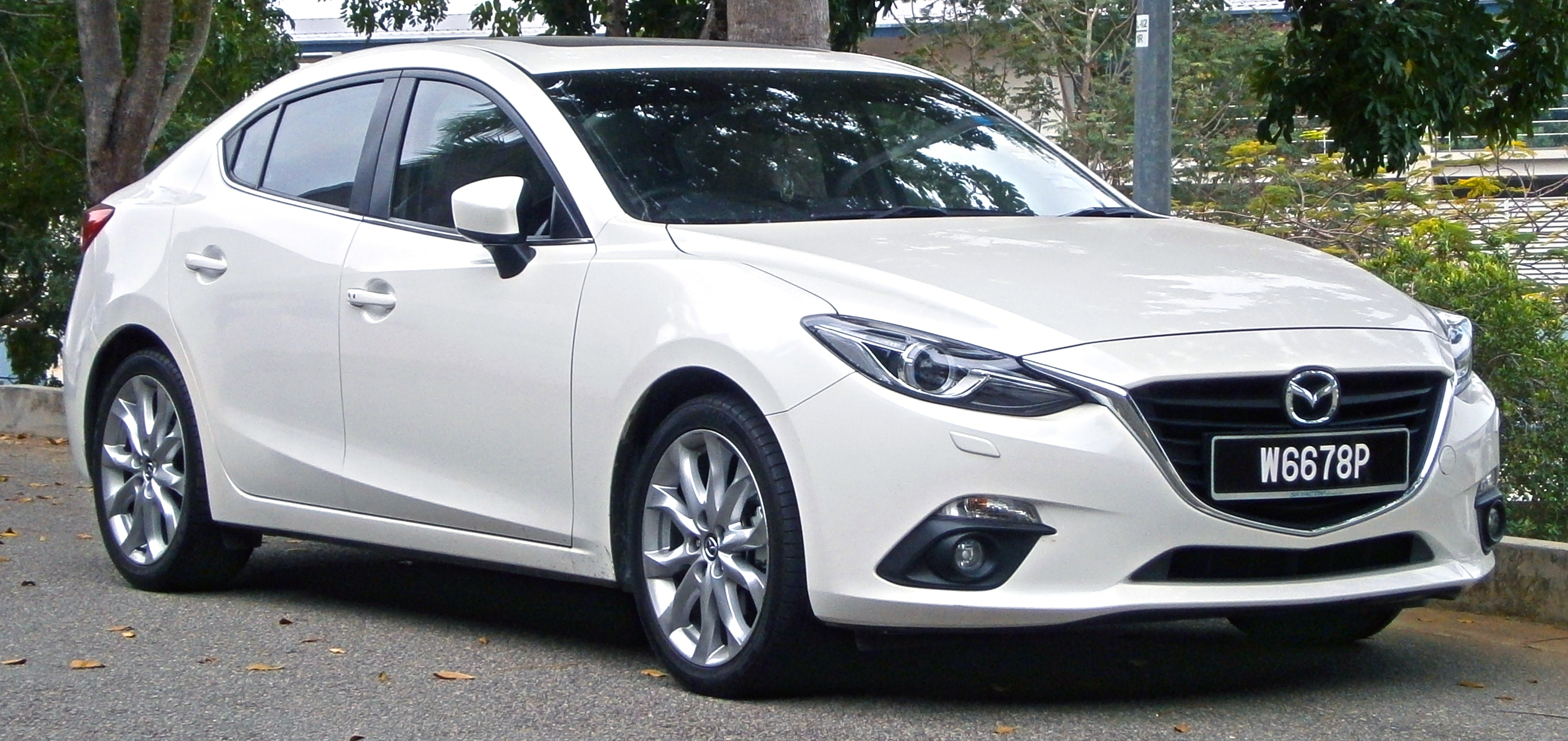 2014 Mazda 3 Sedan (BM) 2.0 SkyActiv (CBU) 4-door sedan